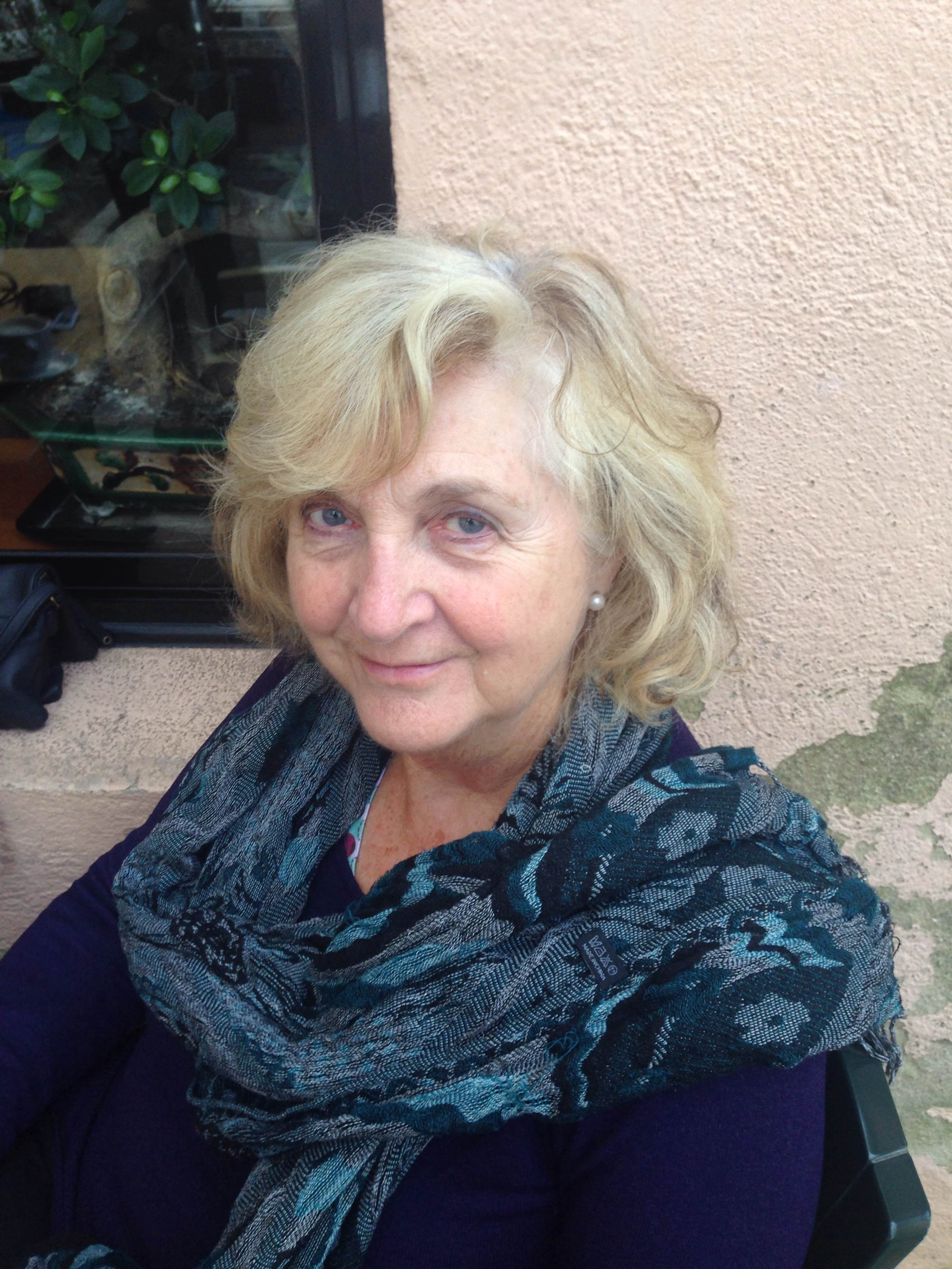 Mary Nash el 2014